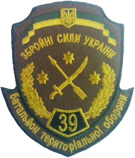 Eмблема 39 б ТрО «Дніпропетровської області. Варто не плутати iз батальйоном «Правого сектору» — «Днiпро-2», який був оголошений у квiтнi водночас з батальйоном МВС «Днiпро-1».